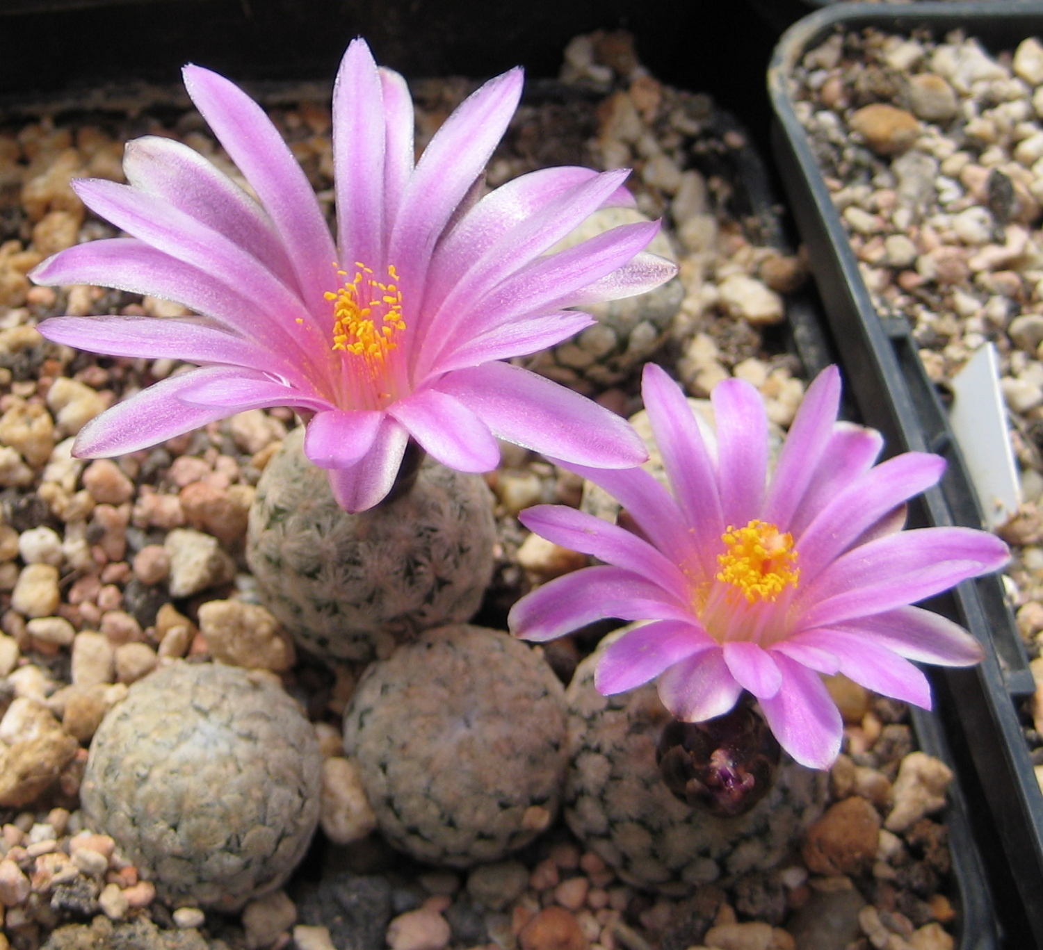 Turbinicarpus valdezianus in Kultur